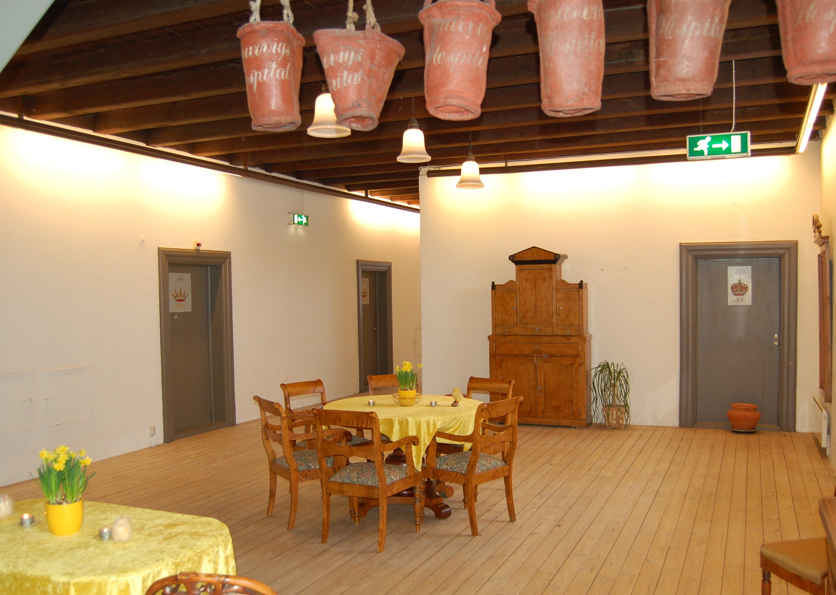 Inne i Hospitalet, Larvik